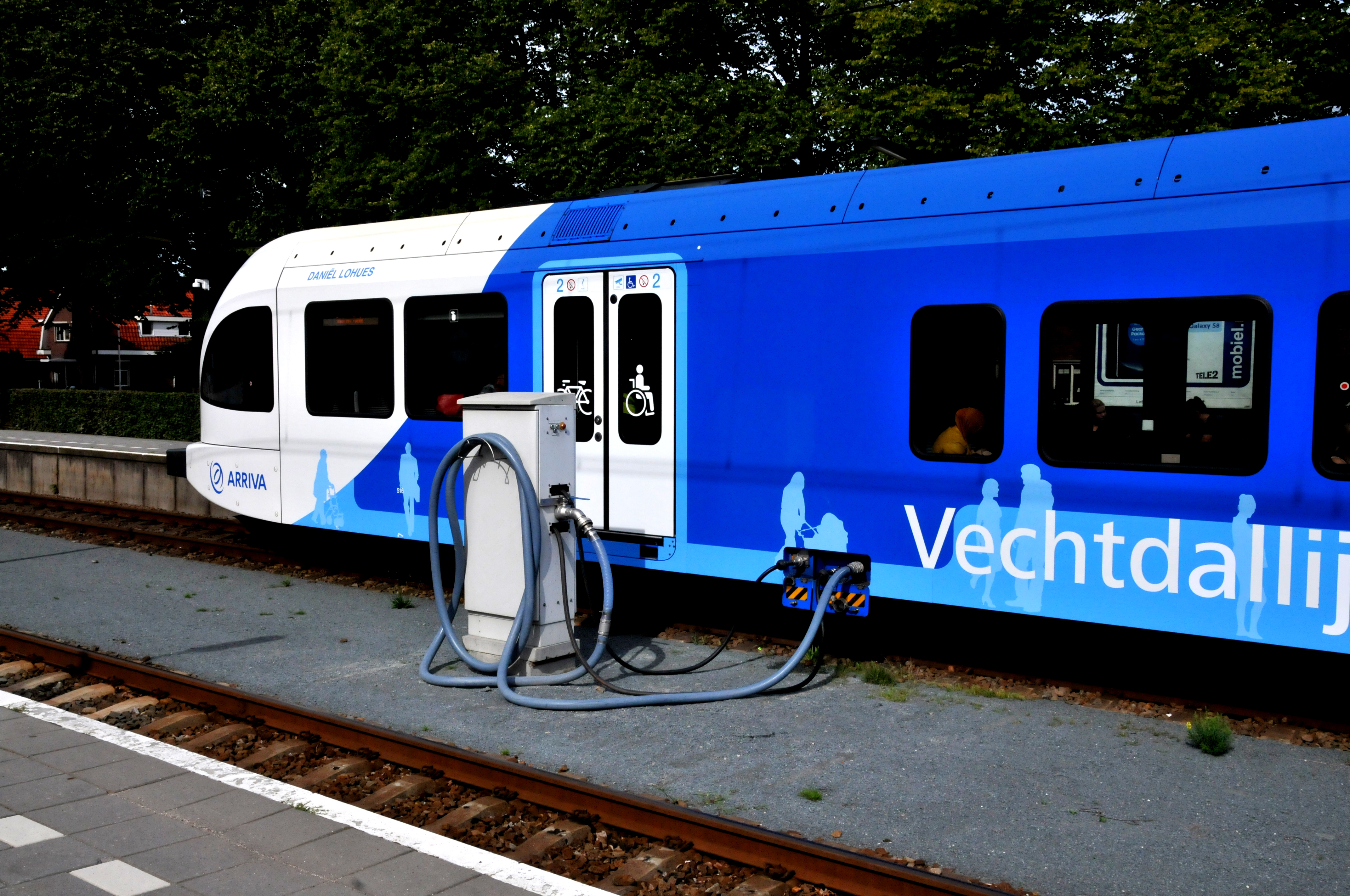 Toilet afvoer inrichting van Arriva treinstel 10.516 van het type Stadler Rail type GTW te Emmen.